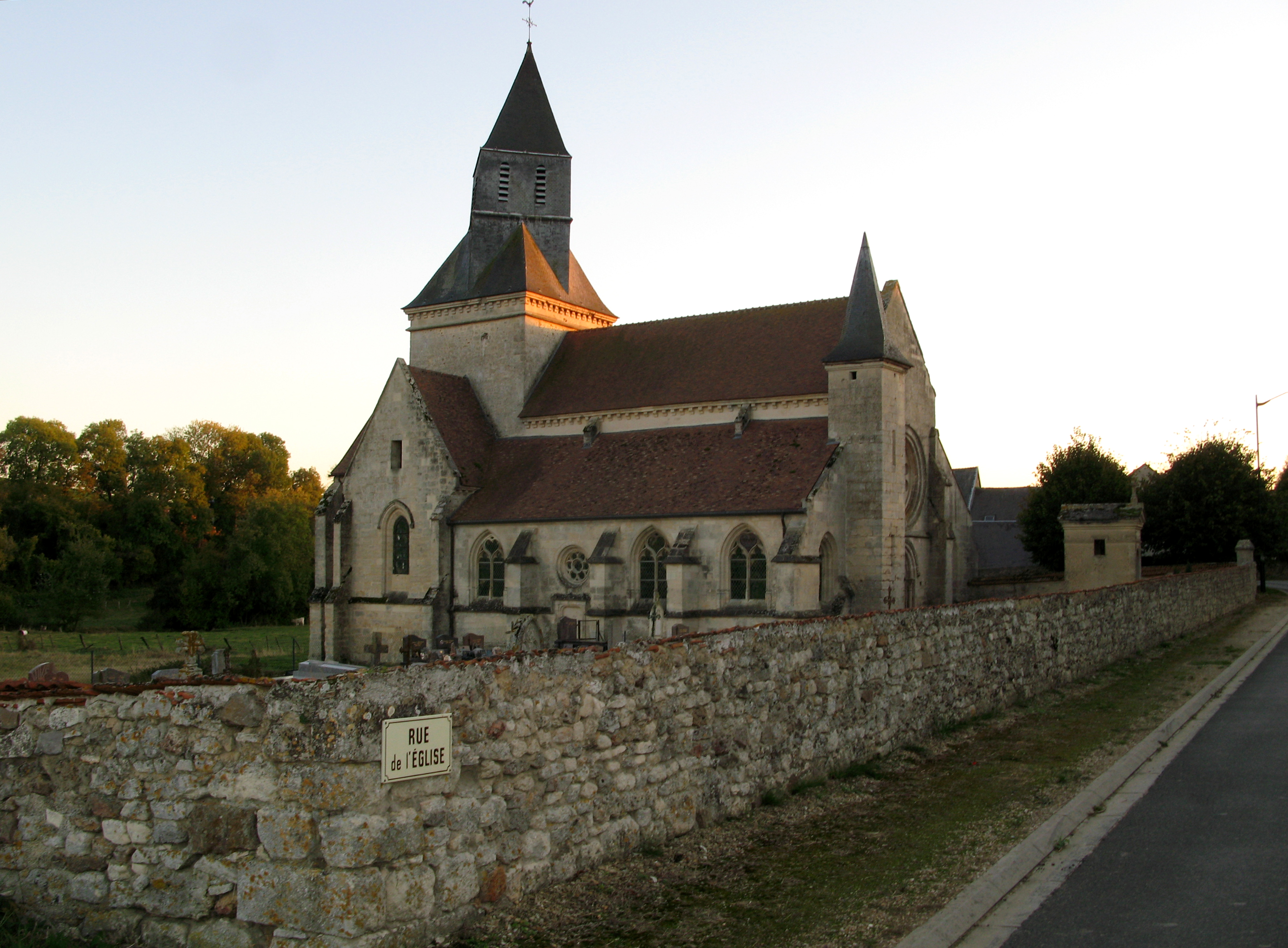 Coulonges-Cohan (Aisne, France) - L'église du hameau de Cohan entouré de son cimetière.